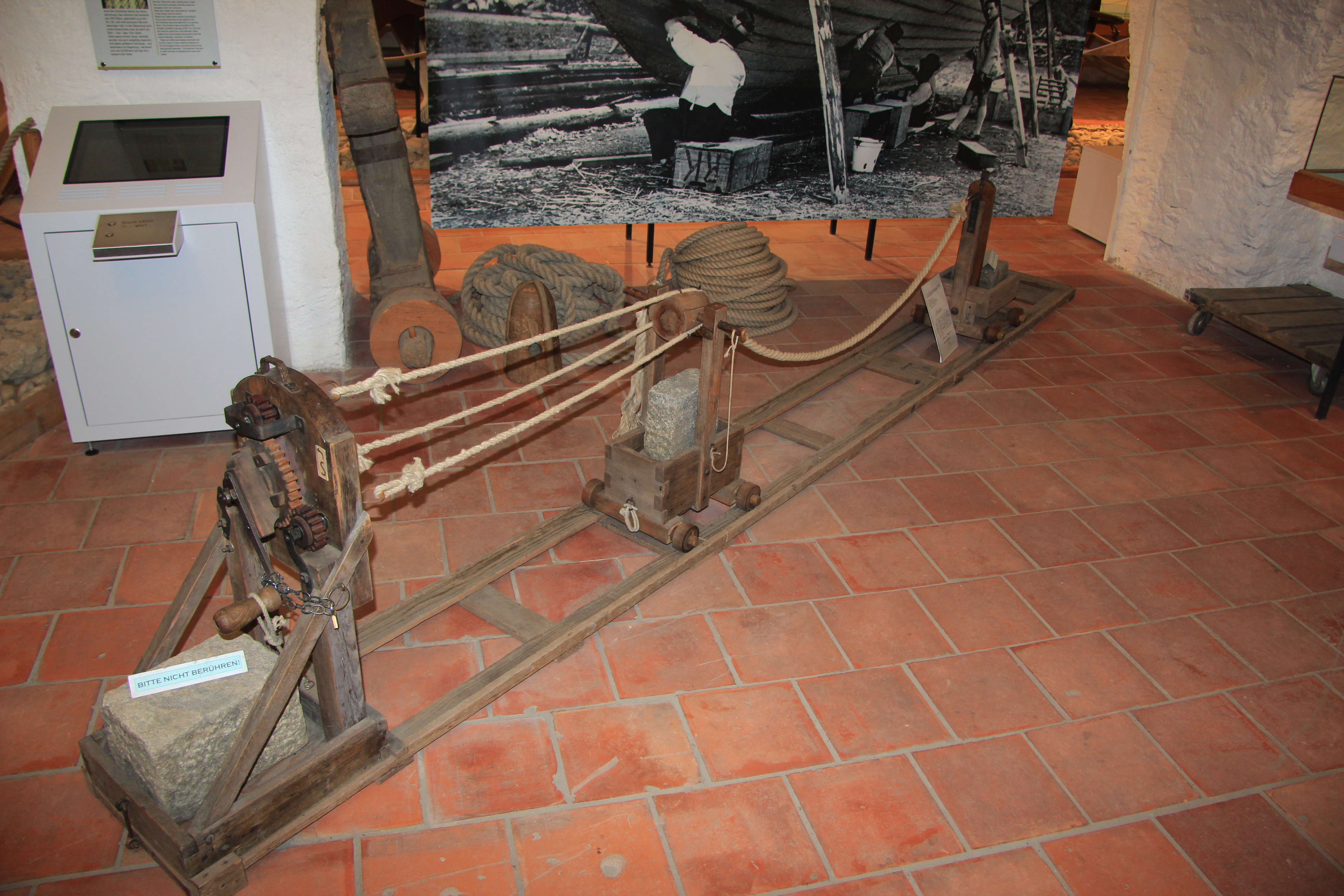 Schifffahrtsmuseum im Erlashof in Spitz, Niederösterreich